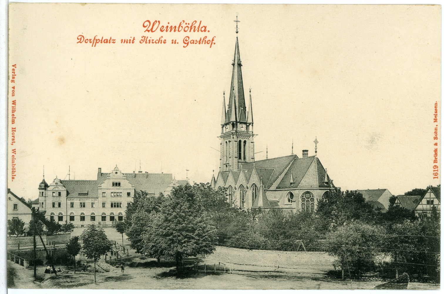 Weinböhla; Dorfplatz mit Kirche und Gasthof This postcard is from publisher Brück & Sohn in Meißen ( postcard has a unique number 01619 and is available in a higher resolution at the publisher. This images was uploaded in a cooperation project between Wikipedians and the publisher.